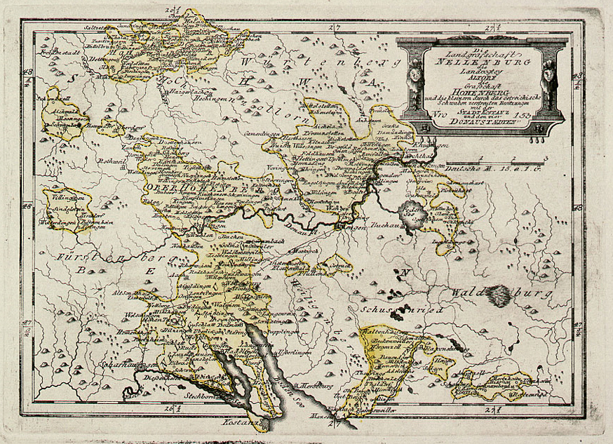 Die Landgrafschaft Nellenburg die Landvogtey Altorf die Grafschaft Hohenberg und die kleinern durch das östreichische Schwaben zerstreuten Besitzungen mit der Stadt Kostanz und den vier Donaustaedten. Nro. 153. Kolorierter Kupferstich